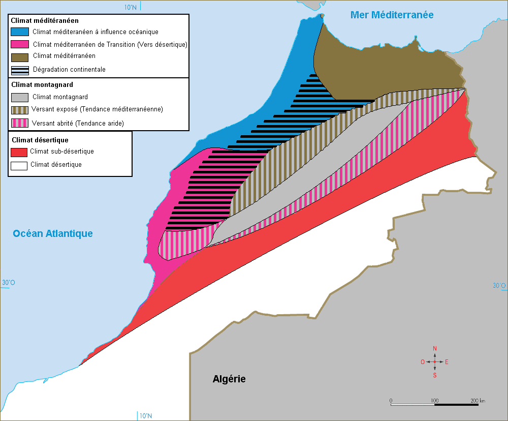 Zones climatiques du Maroc